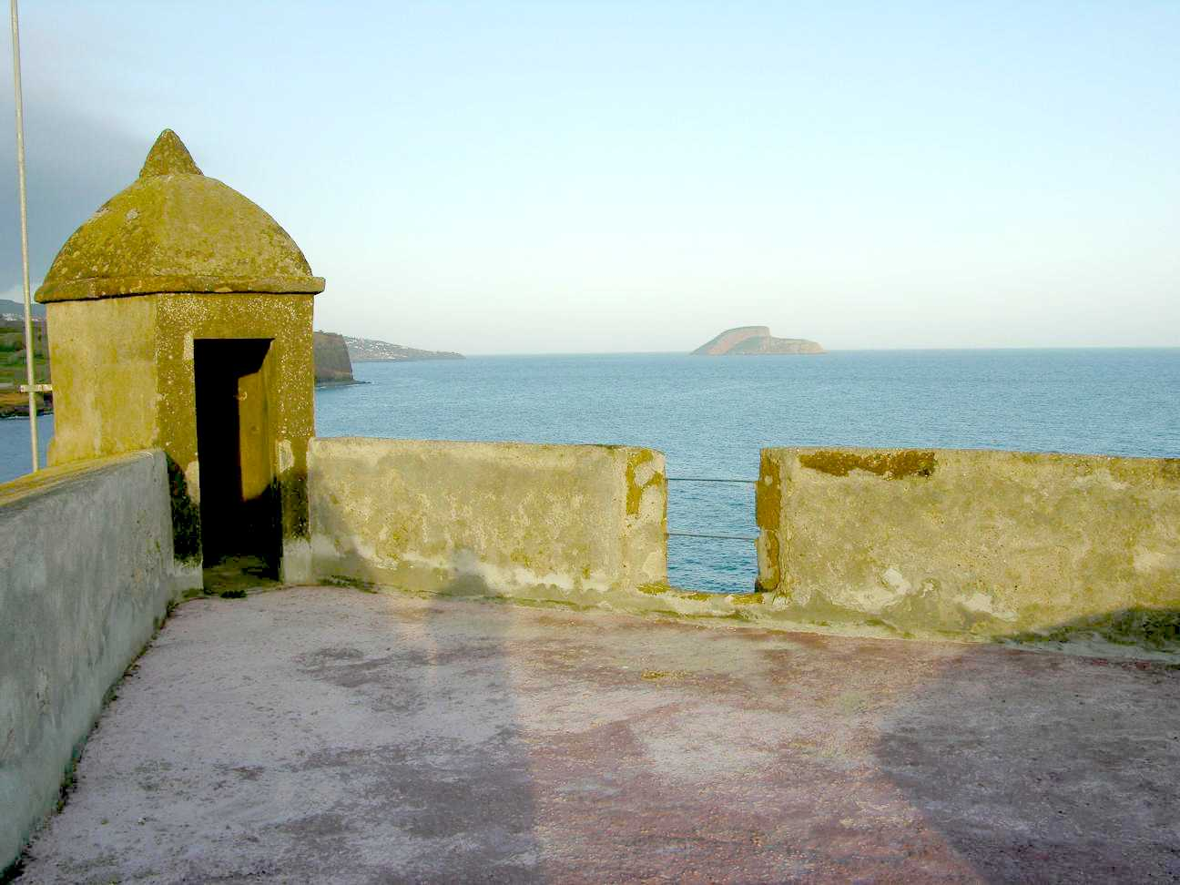 Forte de São Sebastião, freguesia de Nossa Senhora da Conceição, cidade e concelho de Angra do Heroísmo, ilha Terceira, Açores: aspecto de uma guarita; ao fundo os ilhéus das Cabras.